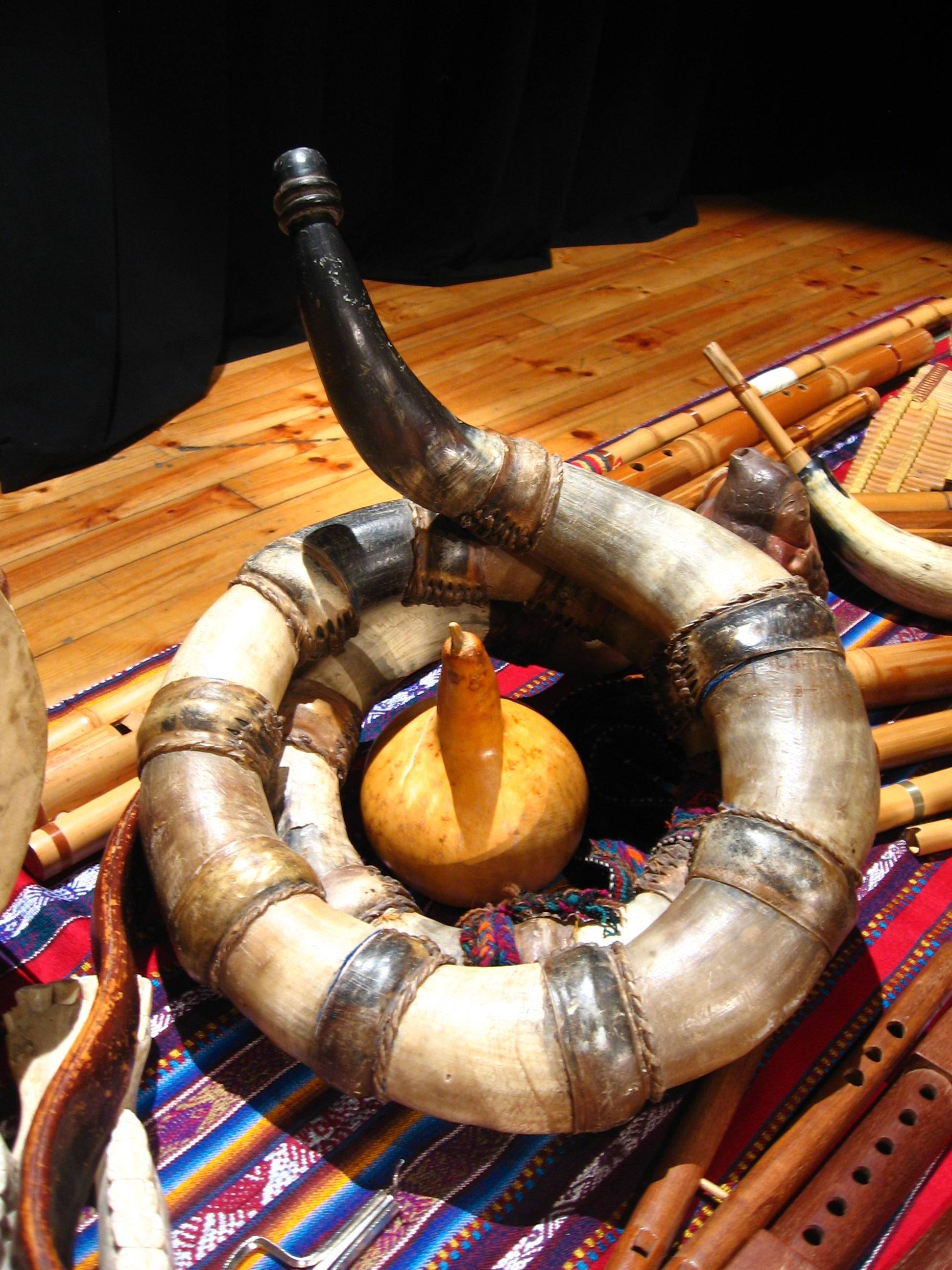 Trompeta inca hecha con cuernos de vaca